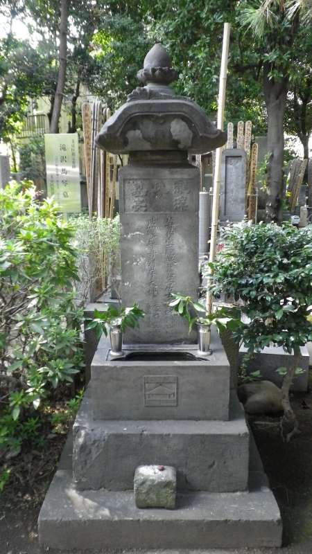 滝沢馬琴の墓